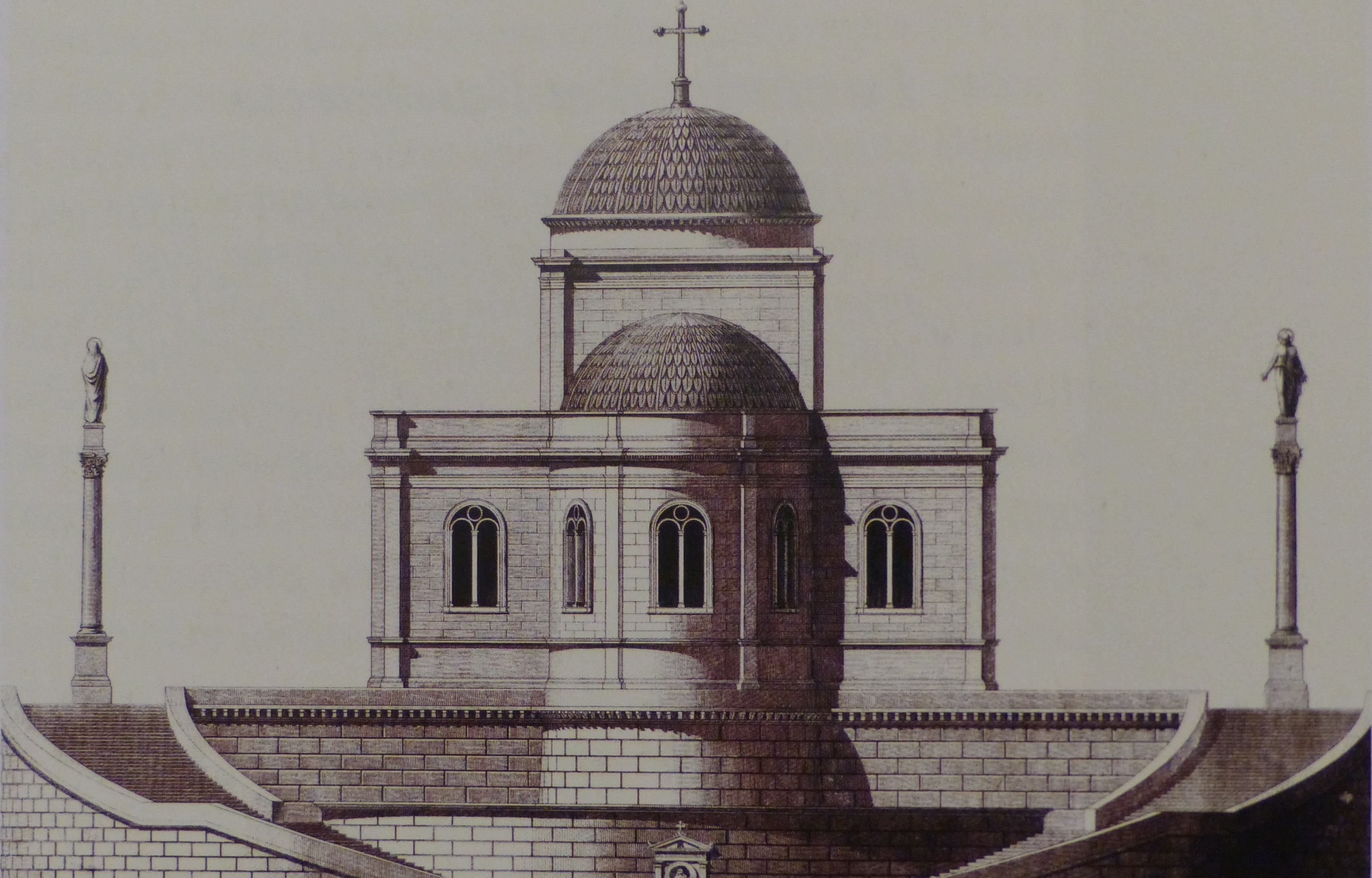 Projet d'Antoine-Marie Chenavard (1830) pour une église de style néoclassique à Fourvière. Non réalisé.